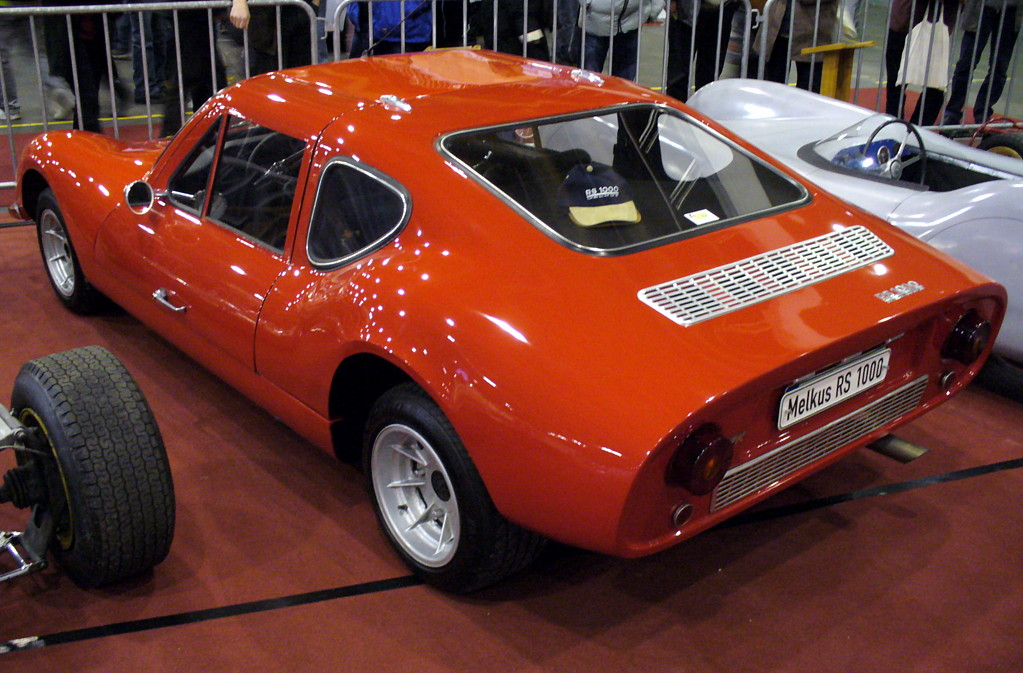 Melkus RS 1000